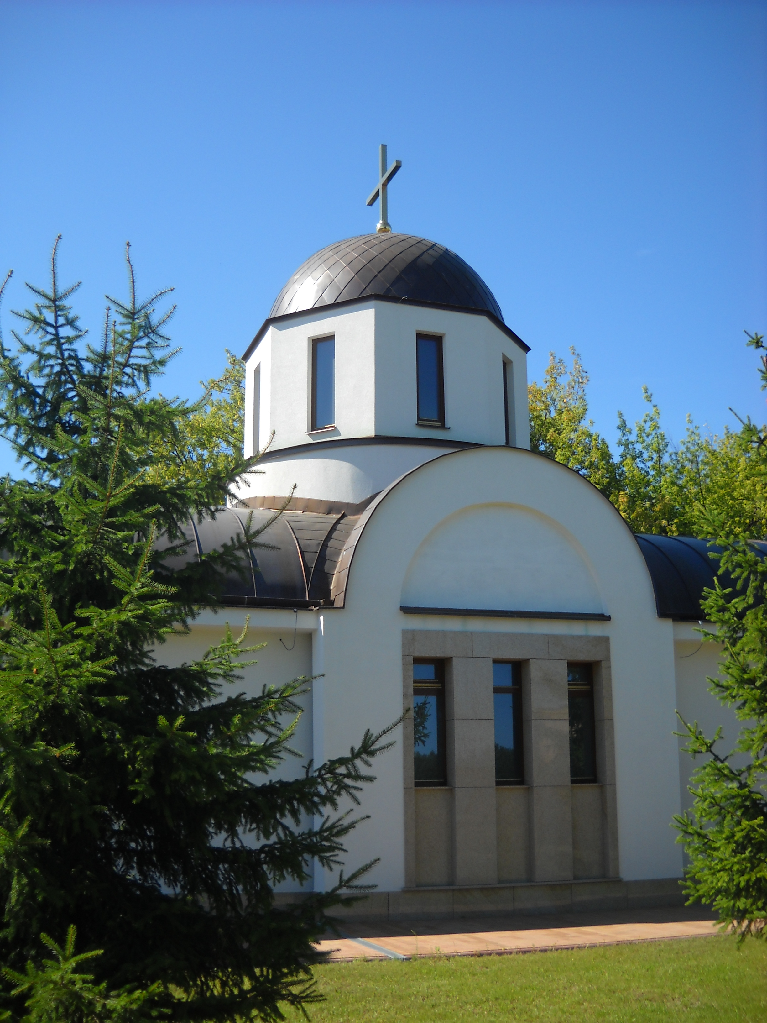 Cerkiew wojskowa w Białej Podlaskiej